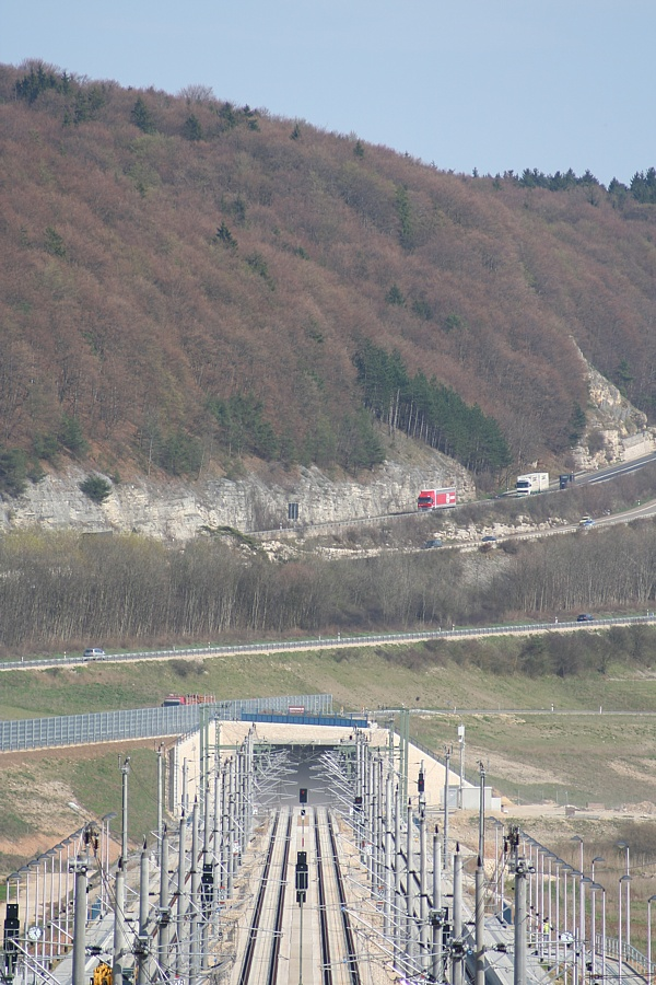 Nordportal des Irlahüll-Tunnels auf der SFS Ingolstadt-Nürnberg